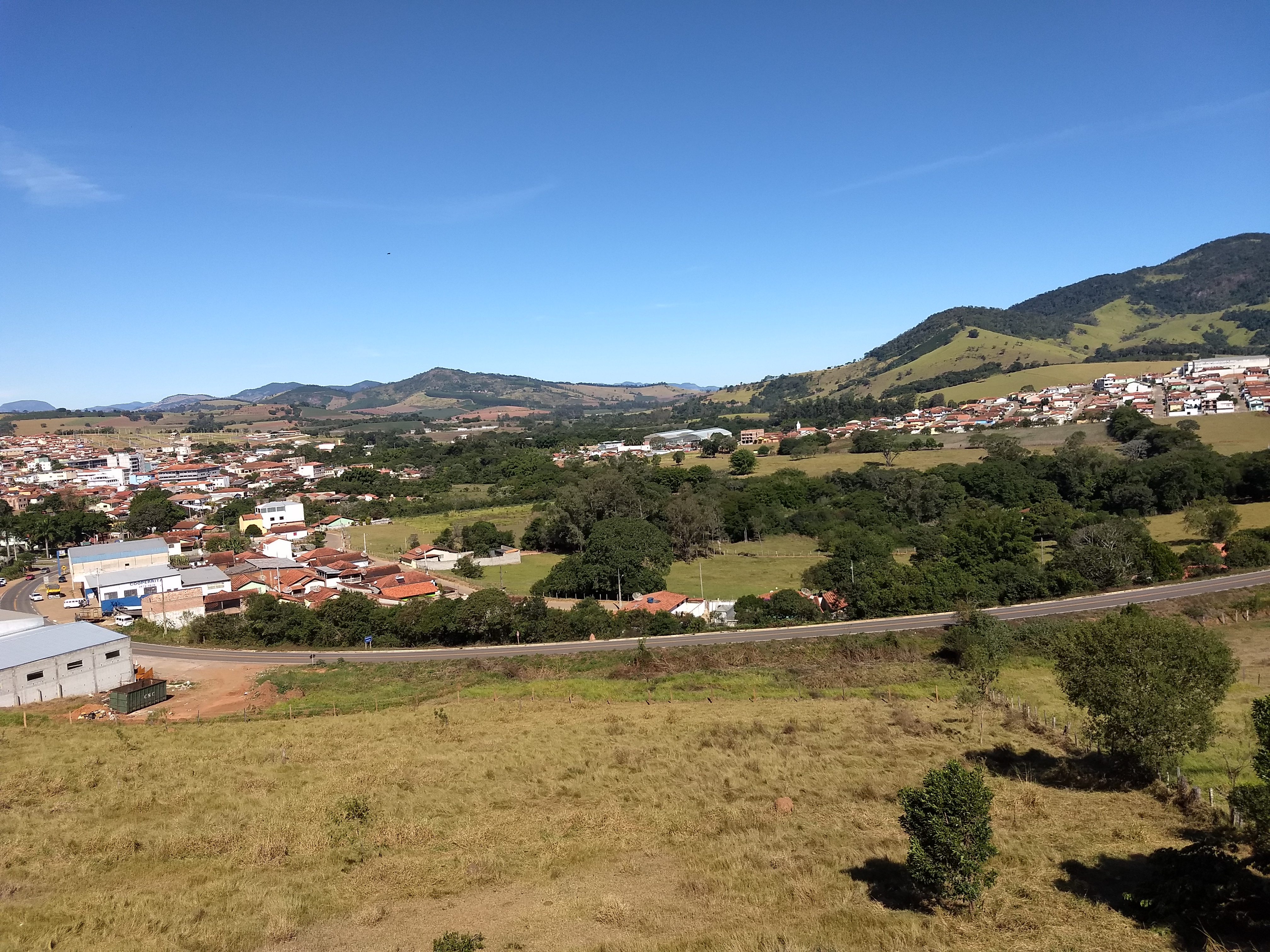 Rodovia MG-173 que passa pela cidade, ao lado esquerdo trecho do bairro Santa Bárbara, Centro e a direita ao fundo o bairro Beira Rio.